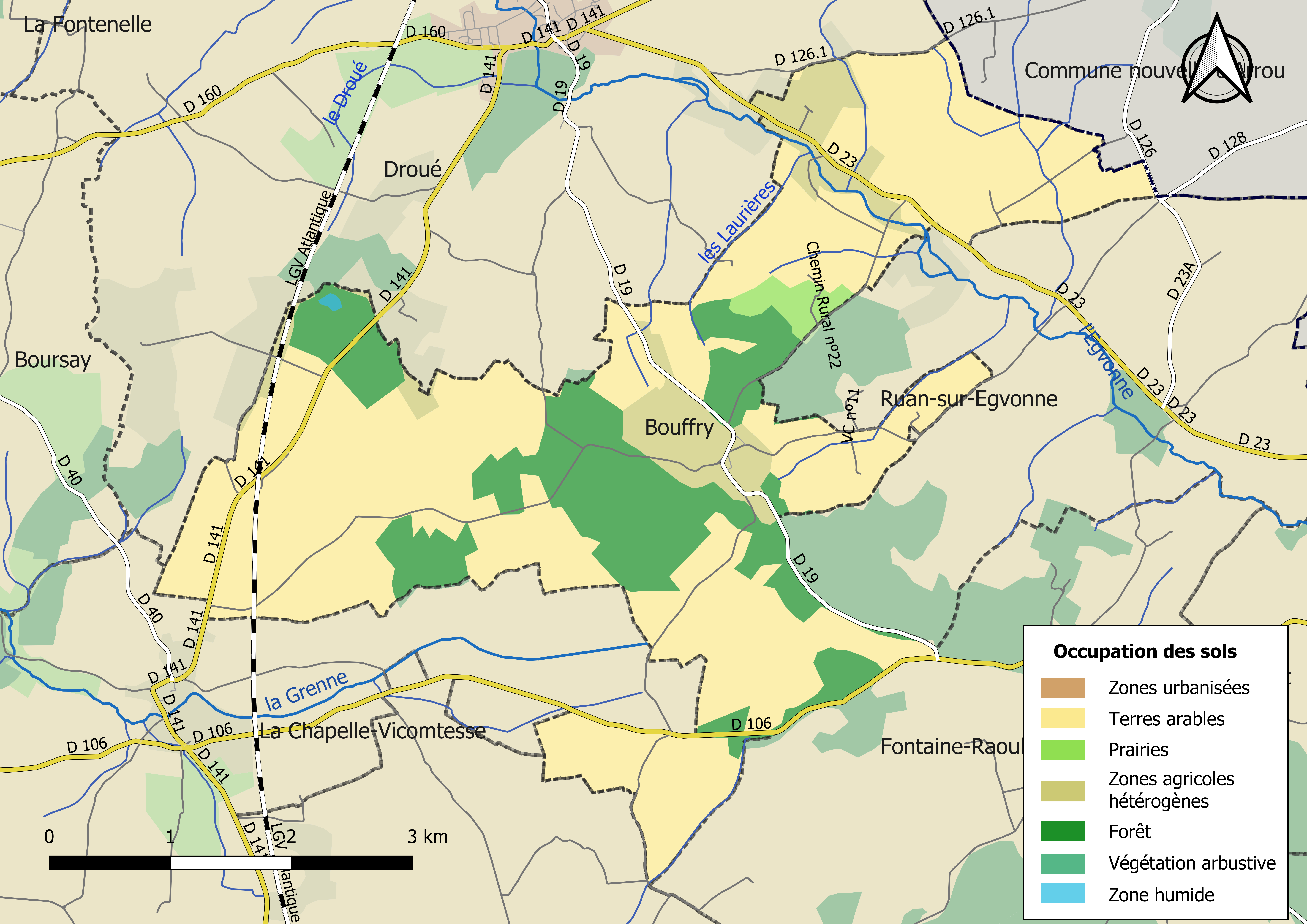 Carte des infrastructures et de l’occupation des sols en 2018 de la commune de Bouffry (France).